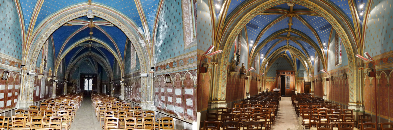 Avant Après restauration